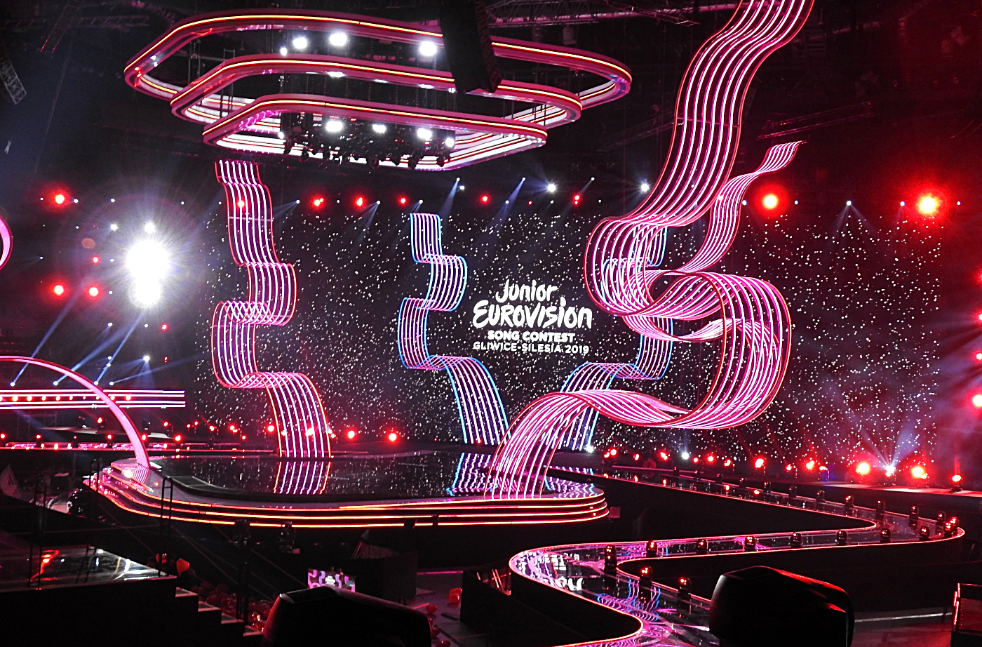 Scena Areny Gliwice, na której odbył się finał Konkursu Piosenki Eurowizji dla Dzieci 2019.